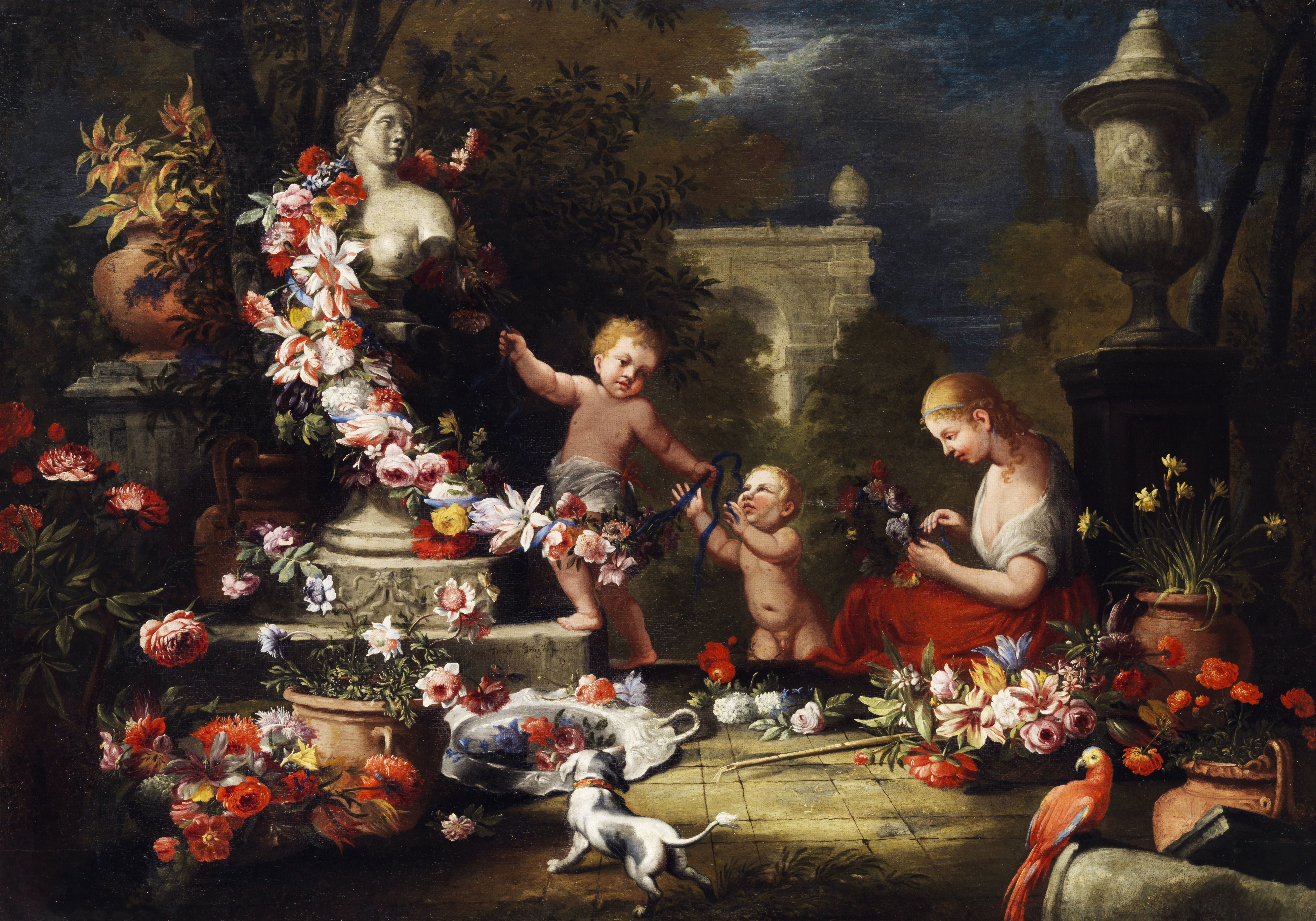 Blumengabe an die Göttin Venus